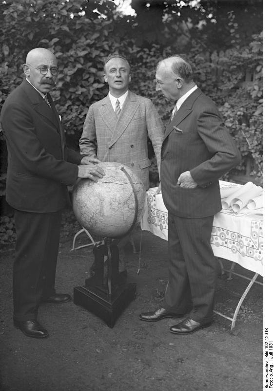 Der russische Professor Samoilowitsch, wissenschaftlicher Leiter der Nordpol-Expedition des "Graf Zeppelin" Prof. Samoilowitsch von der Leningrader Universität, eine Kapazität in der Arktisforschung.